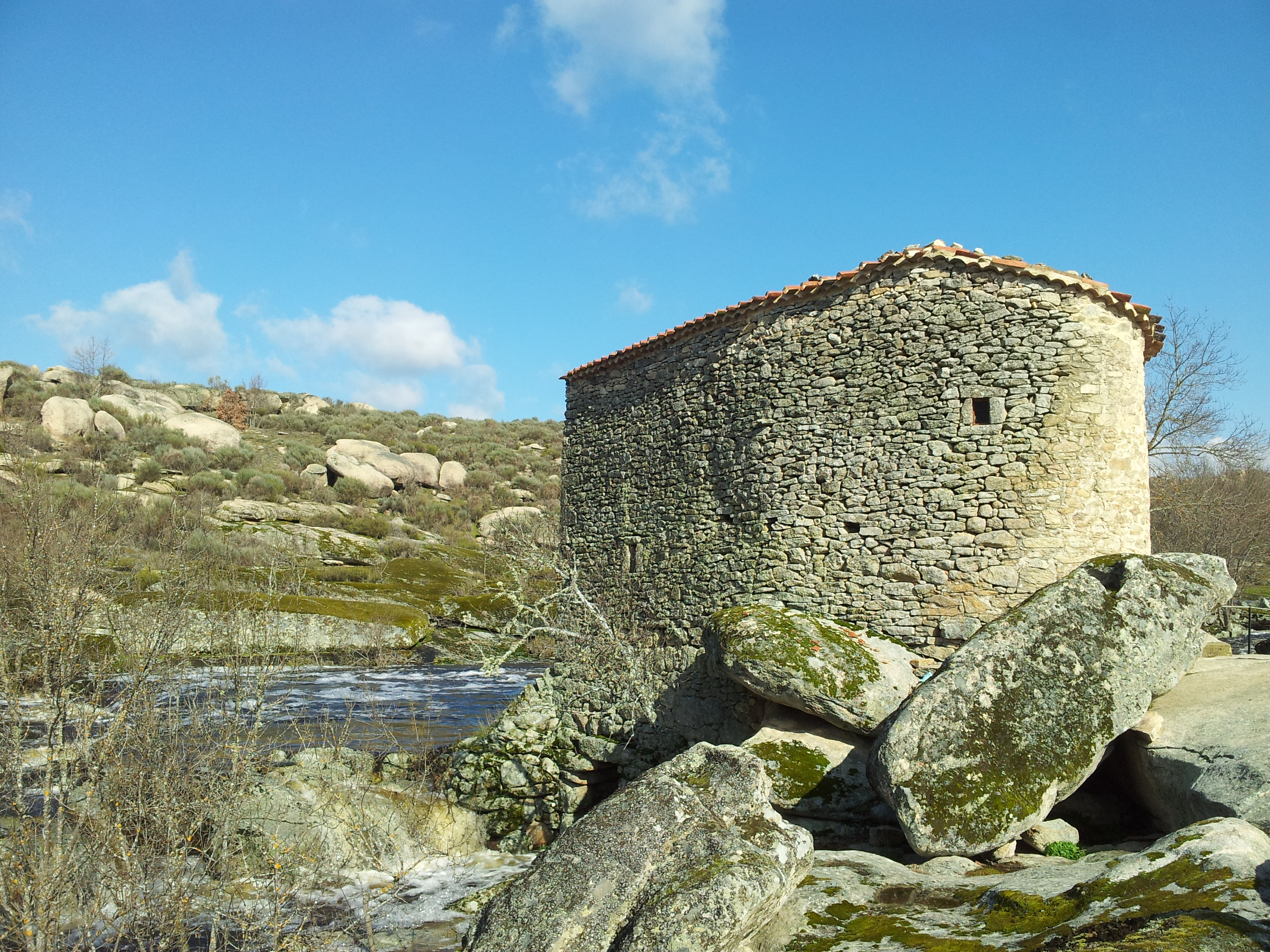 Foto del "Molino de Lucas" (Cabeza del Caballo, Salamanca). Está situado en la zona conocida como Puente Palo.